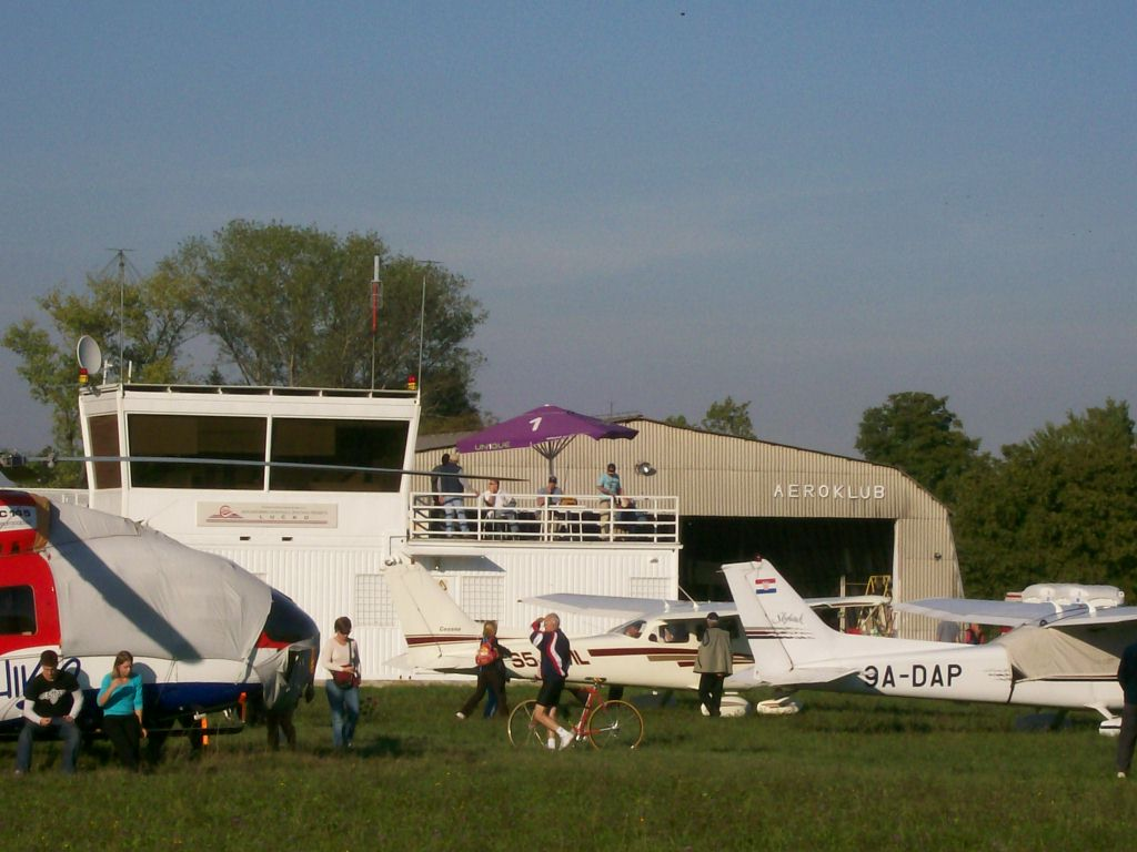 Lucko Airport (Zagreb, Croatia)